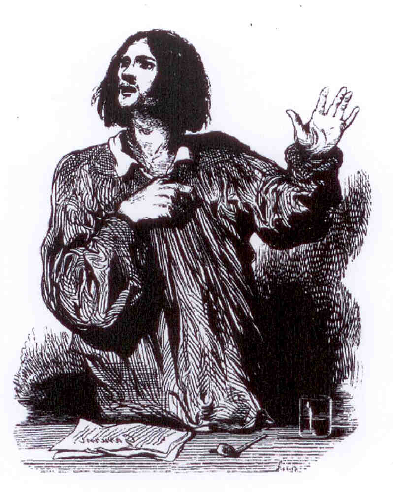 Un goguettier